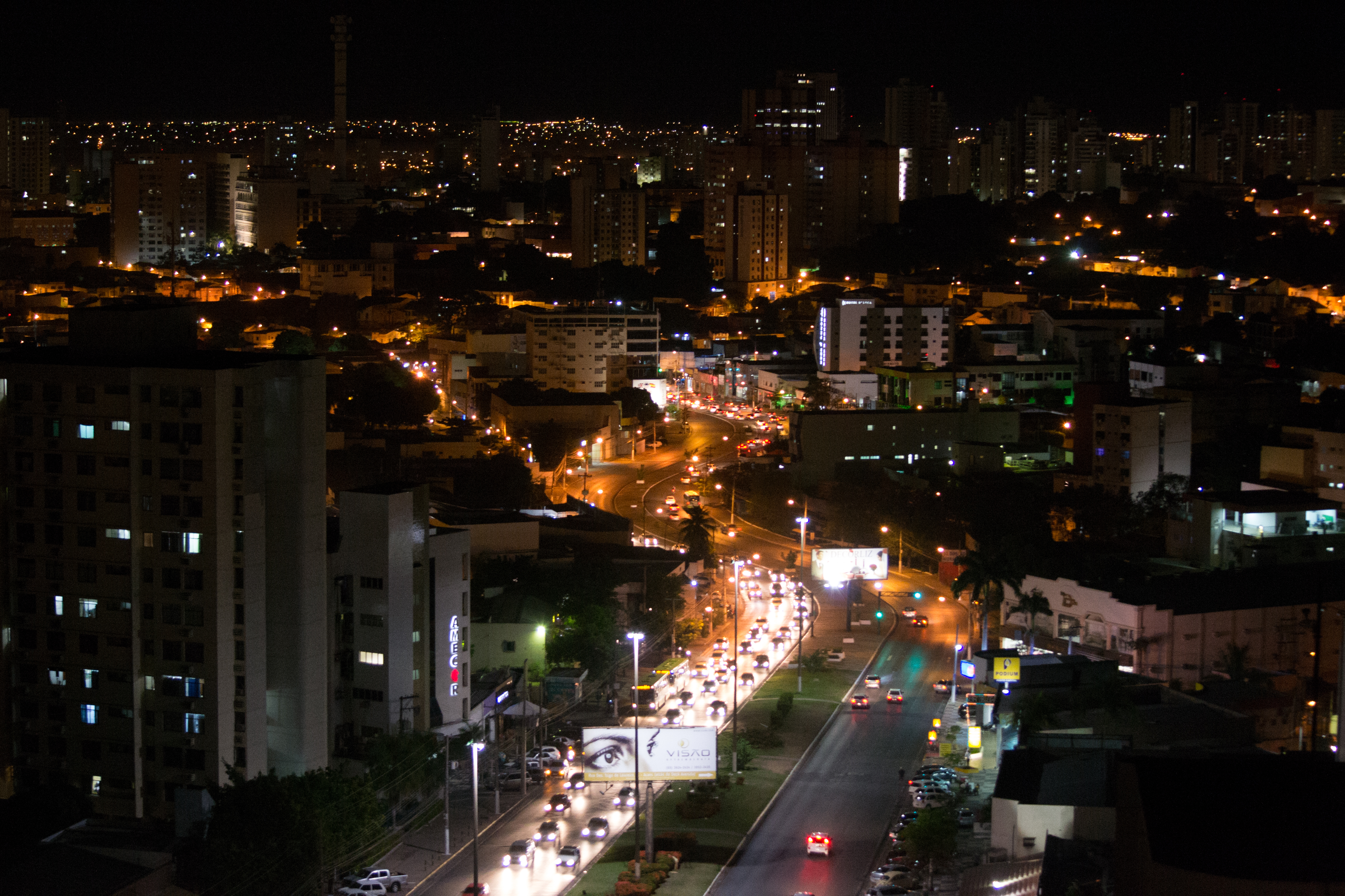 Cuiabá at Night